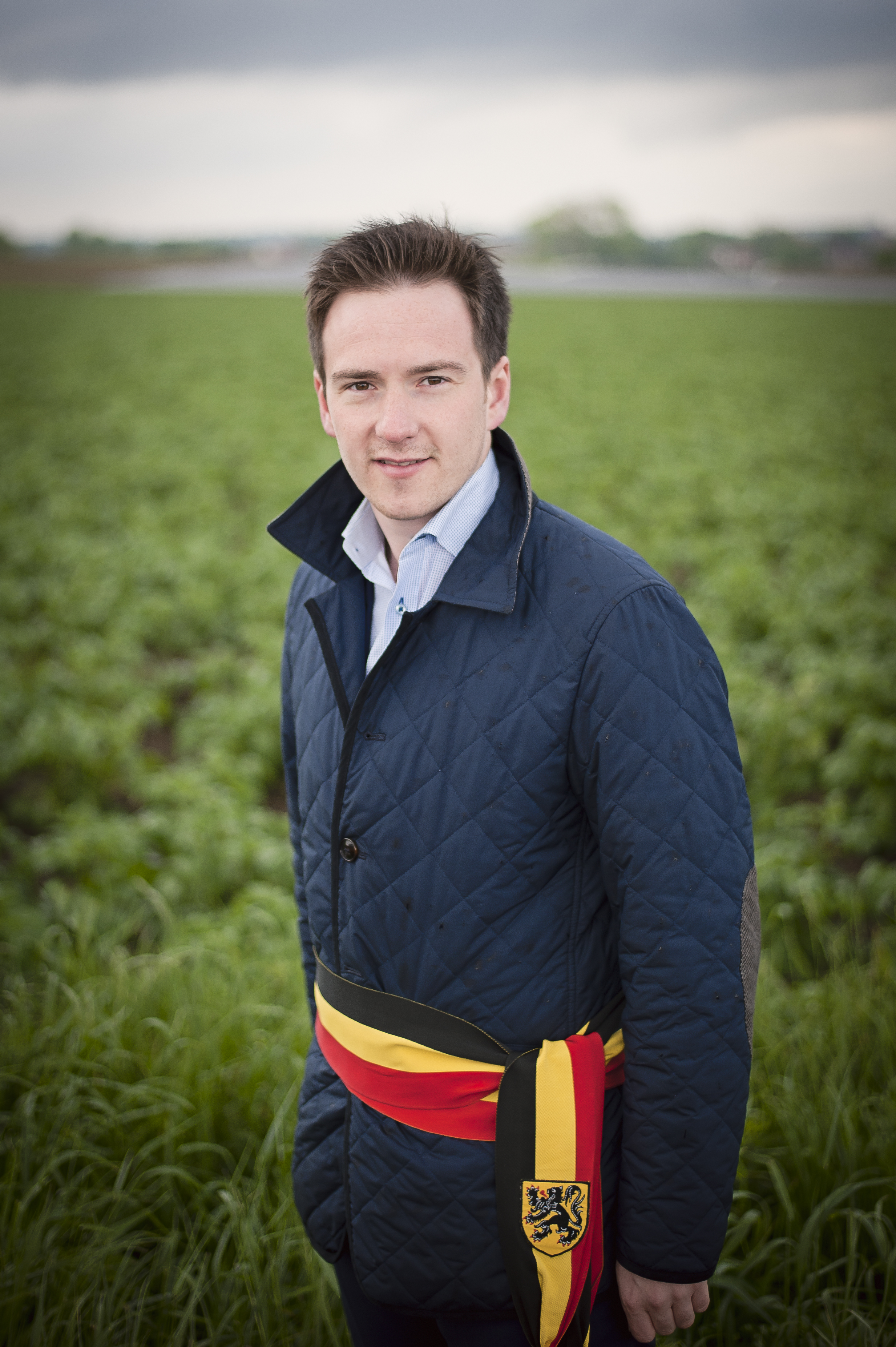 Francesco Vanderjeugd, na zijn benoeming als burgemeester van de gemeente Staden. Depicted person: Francesco Vanderjeugd – Belgian politician